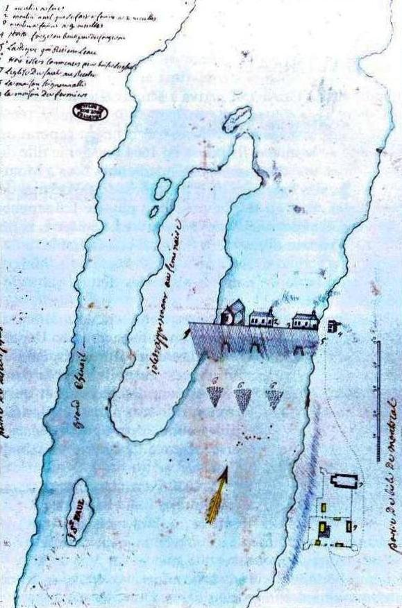 Les moulins du Sault-au-Récollet. En 1726, les sulpiciens ont fait construire une digue entre l'île de Montréal et l'île de la Visitaion afin d'y établir des moulins. La même année, une scierie fut installée. On érigea ensuite un moulin à farine en pierre. Elle était pourvue de trois roues hydroliques et de trois meules.